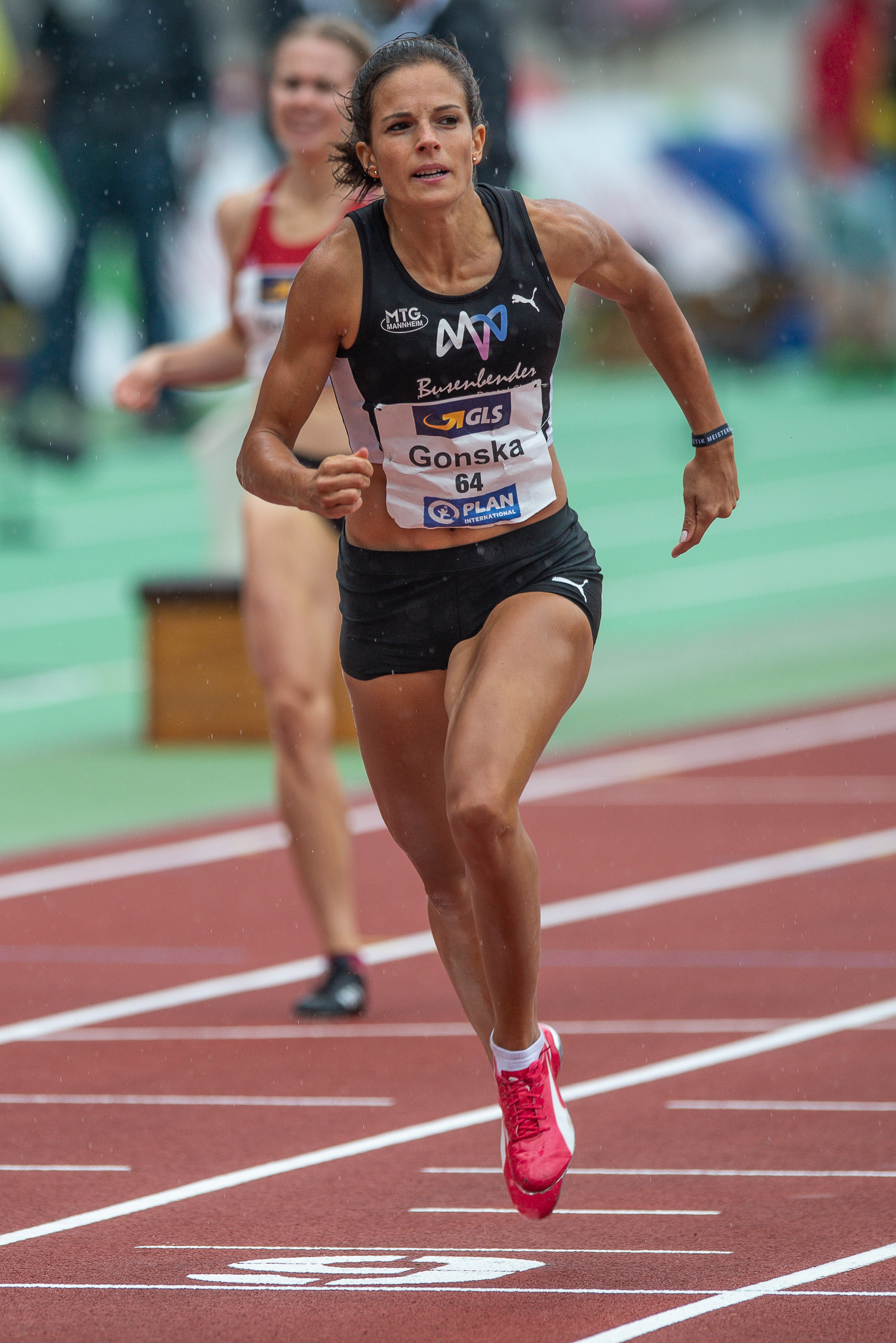 400-Meter-Lauf,DLV,Deutsche Leichtathletik Meisterschaften 2018,Deutscher Leichtathletik-Verband,MTG Mannheim,Max-Morlock-Stadion,Nadine Gonska